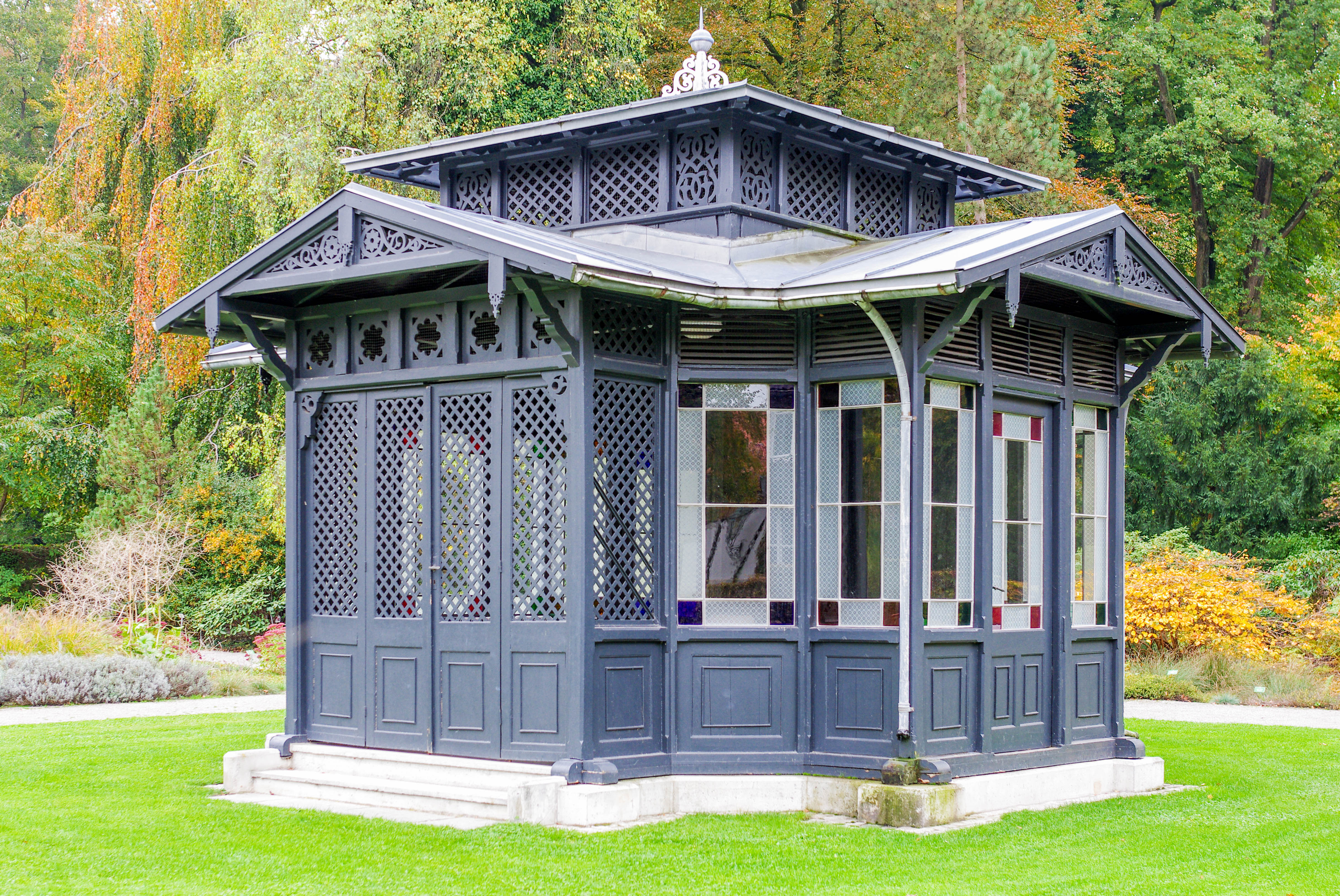 Ansicht des Pavillons von NE, Bauzustand Herbst 2015This is a photograph of an architectural monument.